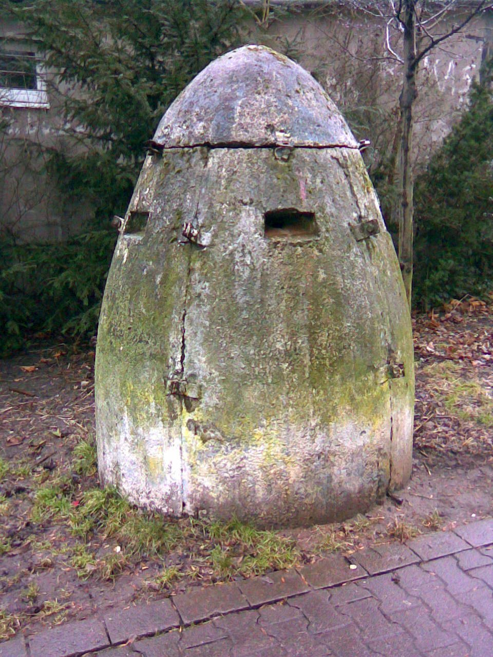 Splitterschutzzelle